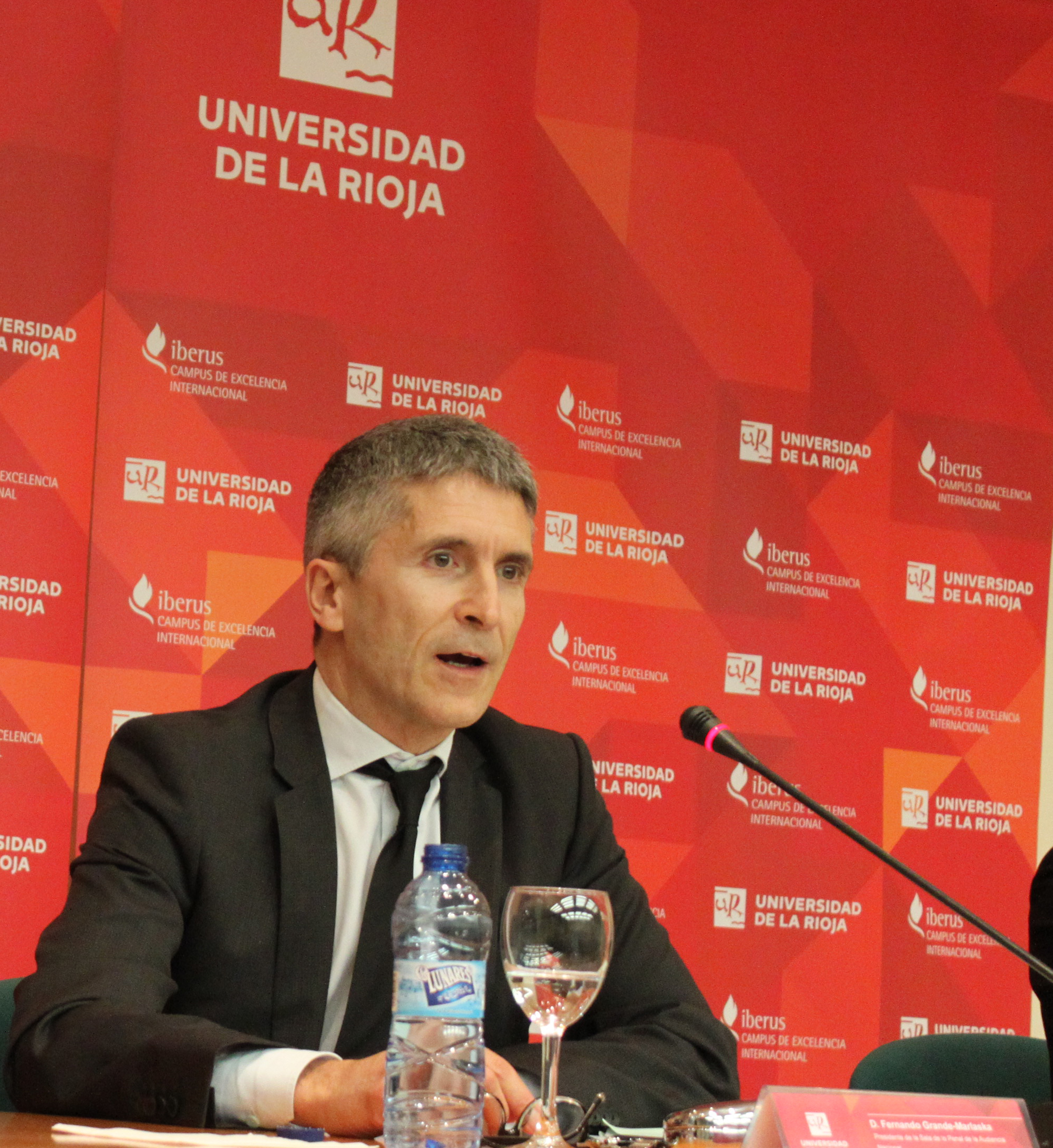 El juez Fernando Grande-Marlaska, en la Universidad de La Rioja.